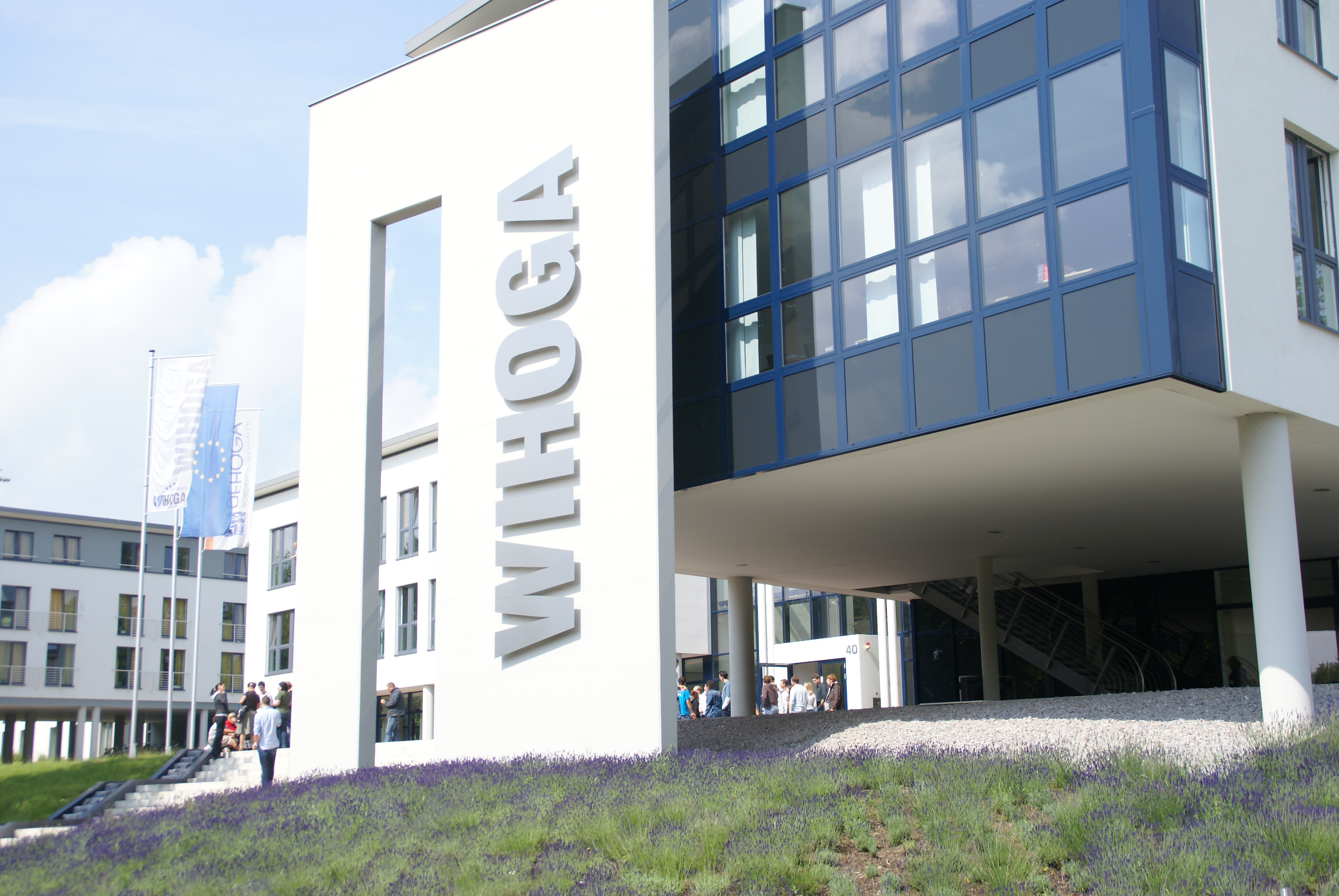 Neubau der Wirtschaftschulen für Hotellerie und Gastronomie 2007